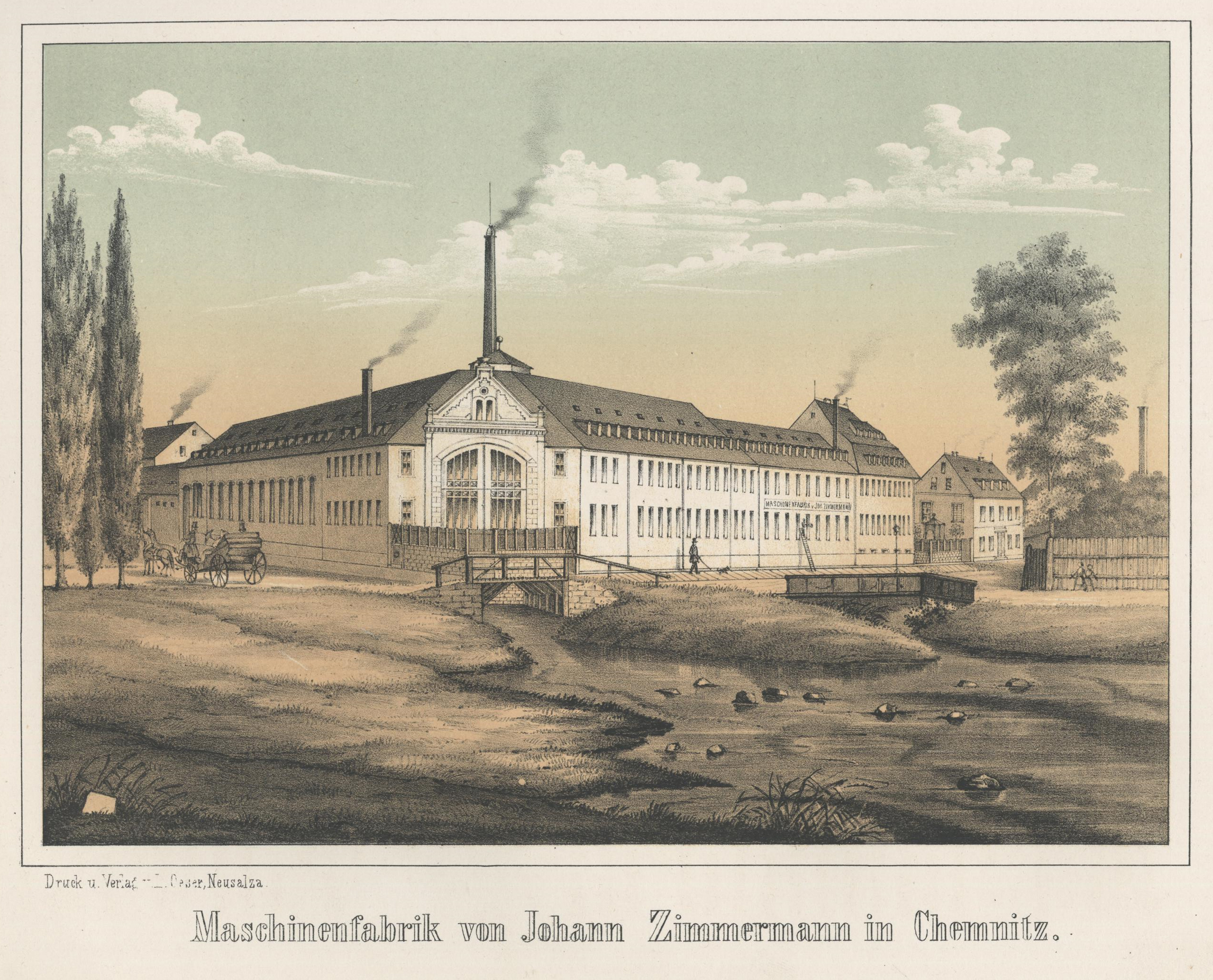 Maschinenfabrik von Johann Zimmermann in Chemnitz aus: Album der Sächsischen Industrie Erster Band